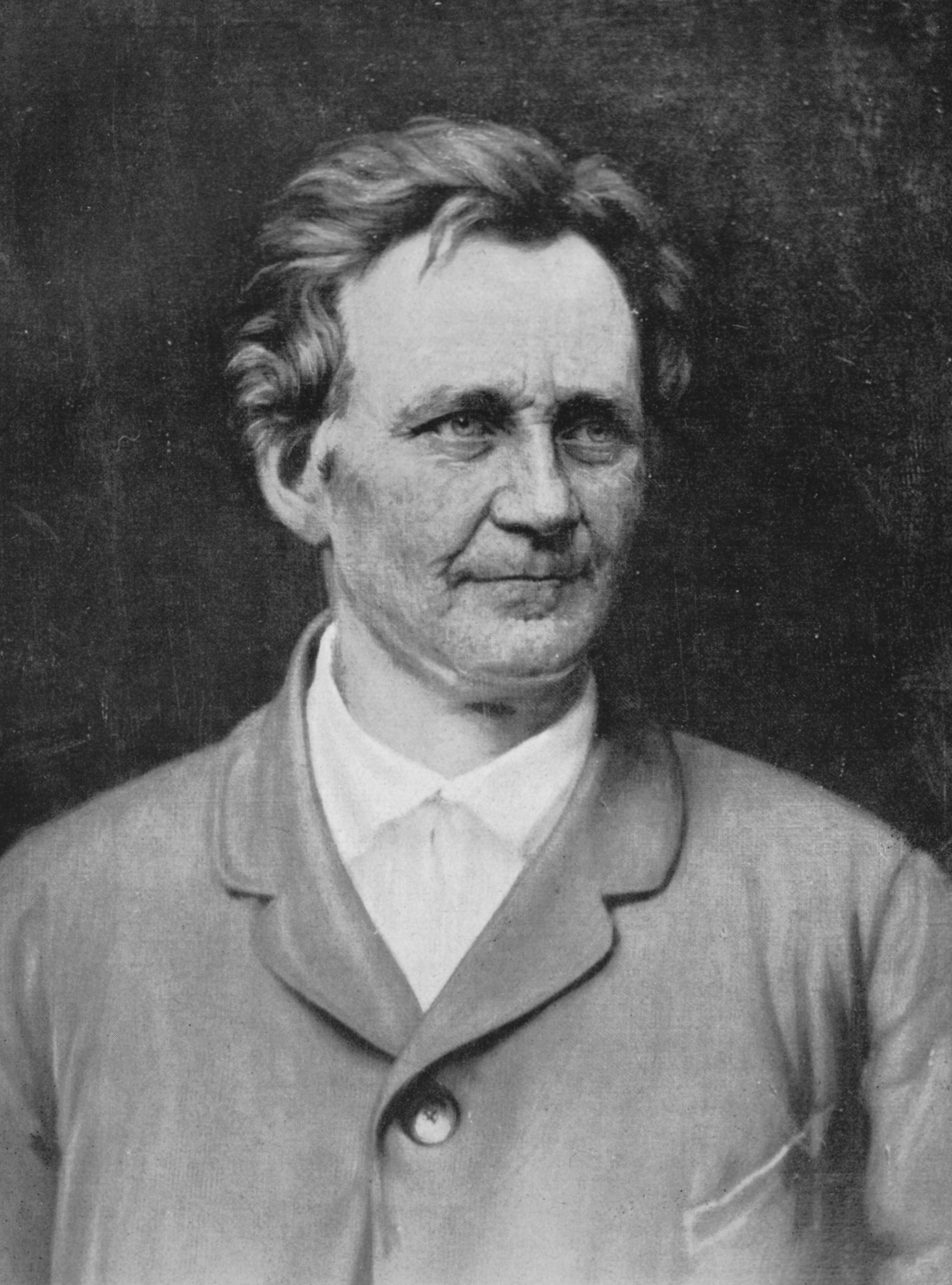 Portrait Mikkel Vinzent Prießnitz